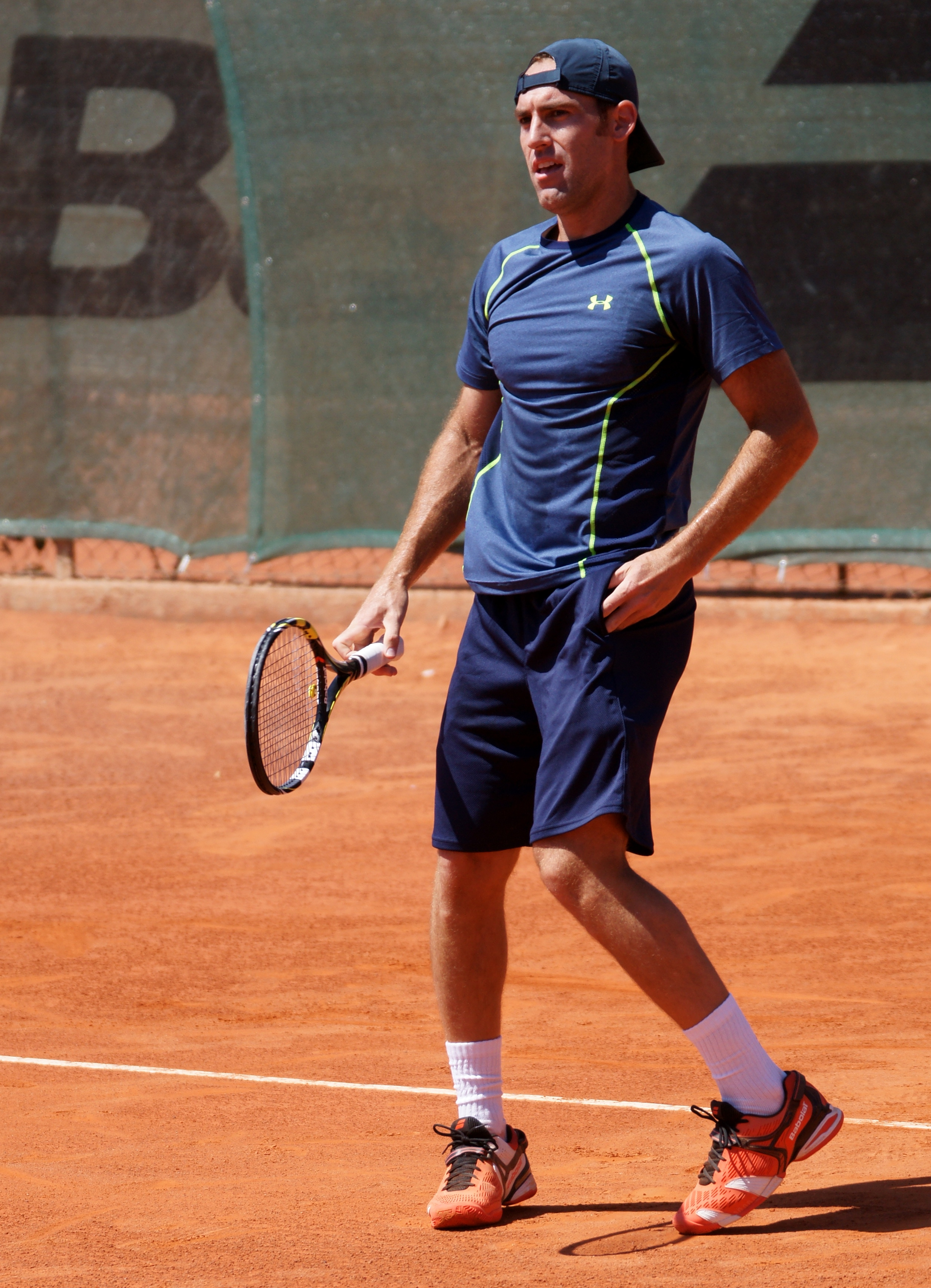 Robby Ginepri Nice Open ATP 2014